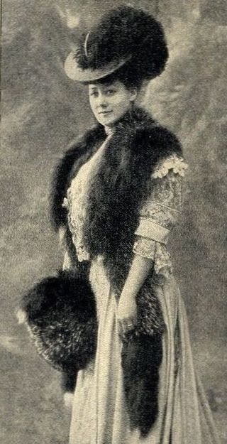 Deutsche Pelzmoden.